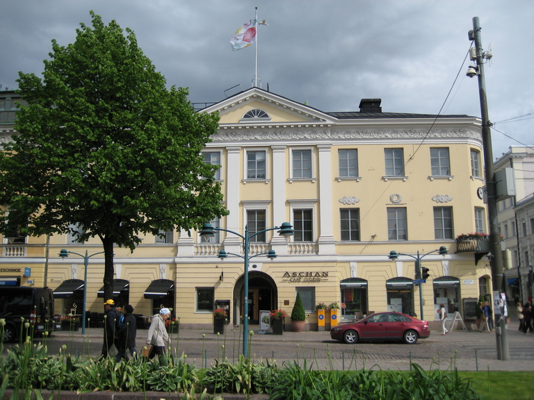 Uschakoffin talo Helsingissä